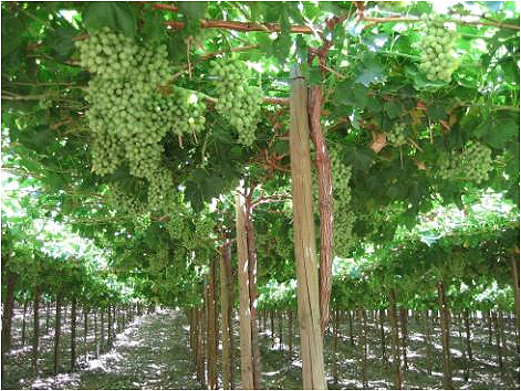 Pergola — Chile